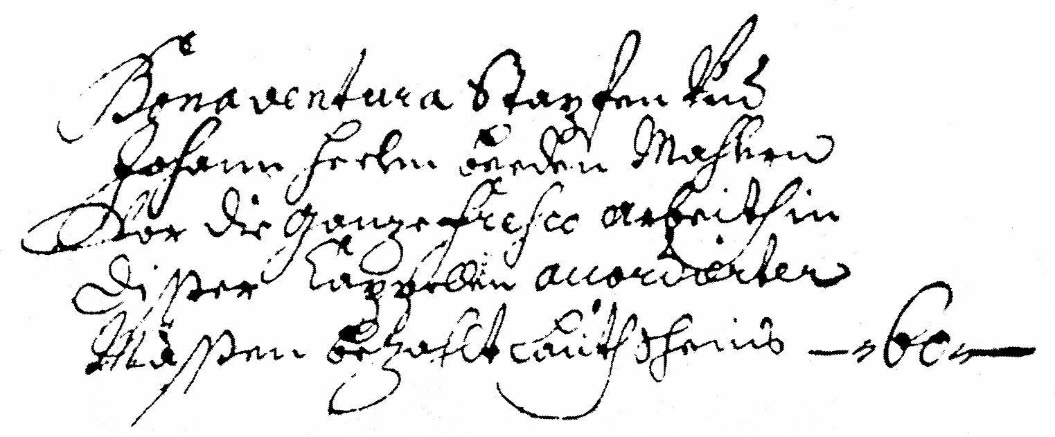 Heiligenrechnungen von St. Leonhard in Pfronten-Heitlern 1725/30: Abrechnung der Kosten für die Freskierung der Kirche mit Bonaventura Stapf und Johann Heel